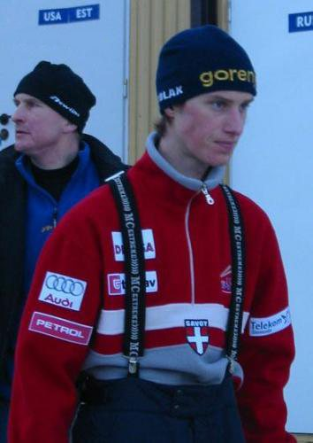 Primož Urh-Zupan